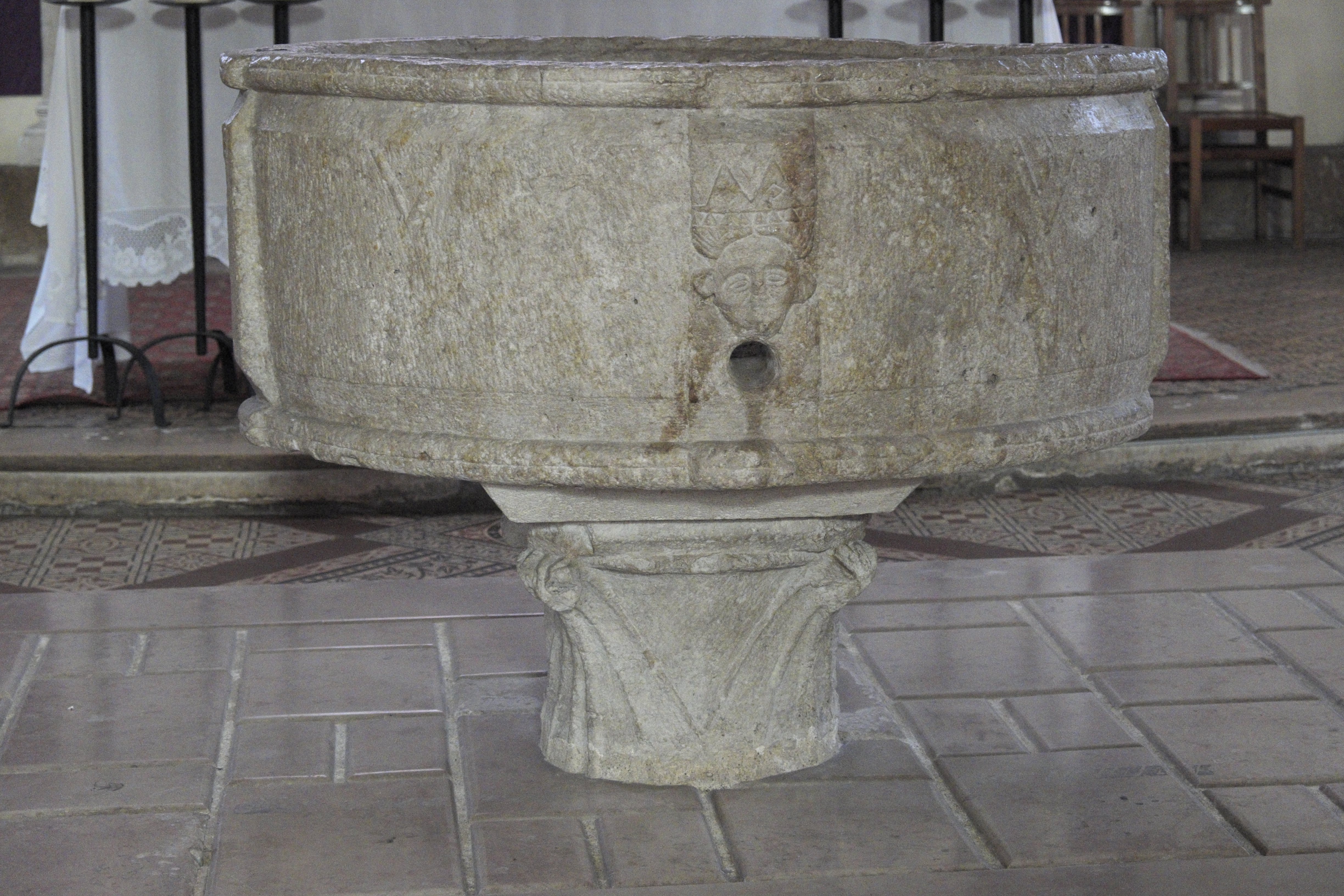 Katholische Pfarrkirche Saint-Martin in Malesherbes im Département Loiret (Centre-Val de Loire/Frankreich), Taufbecken aus dem ersten Viertel des 14. Jahrhunderts